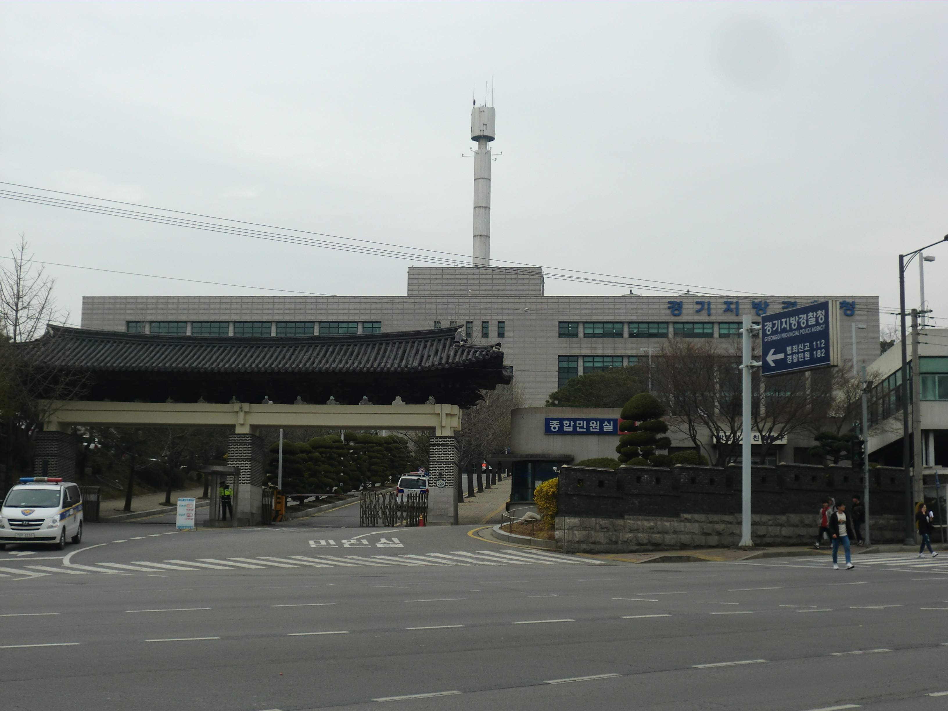 경기도 수원시에 있는 경기지방경찰청